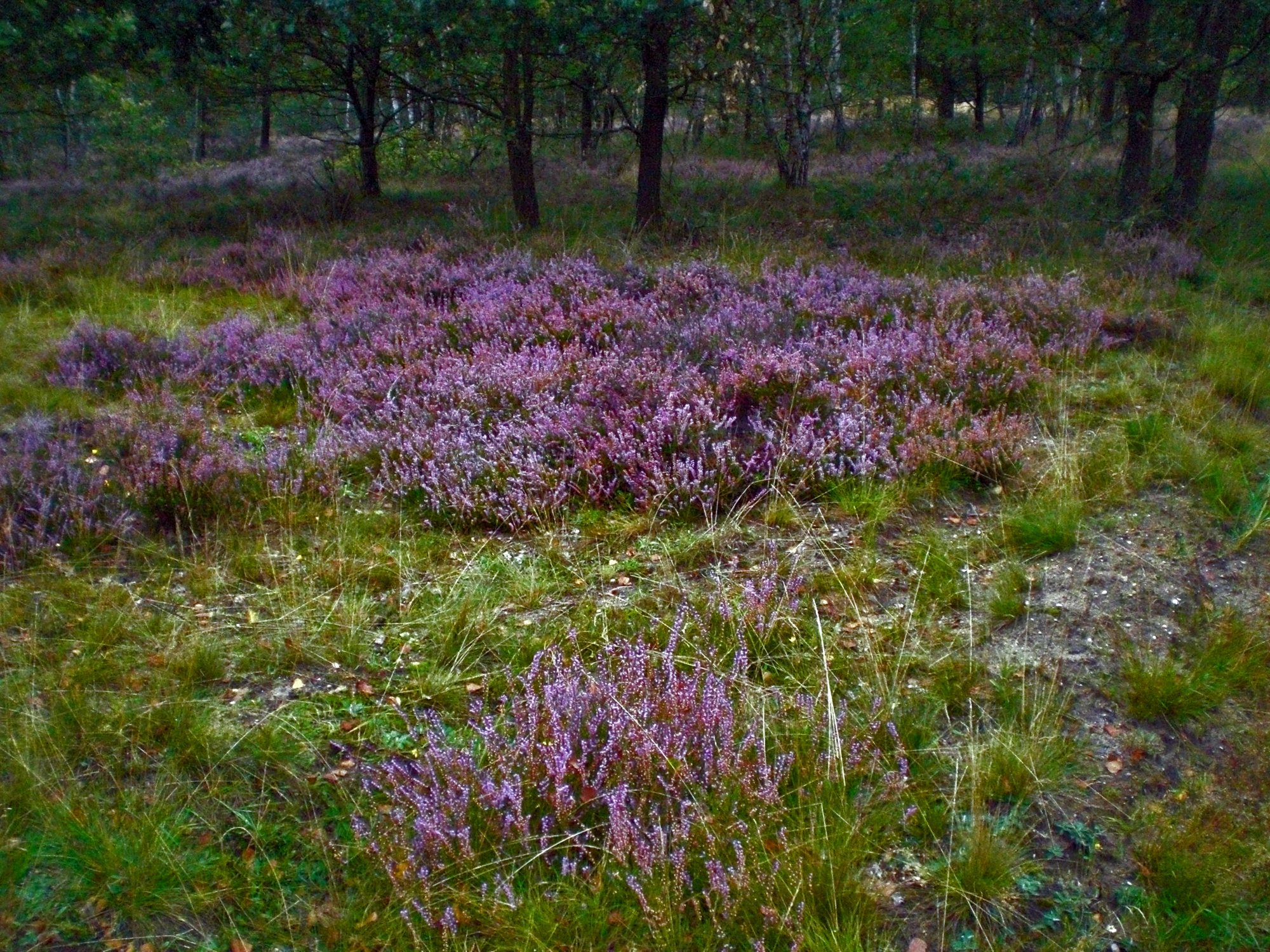 Letzlinger Heide - Blühendes Heidekraut